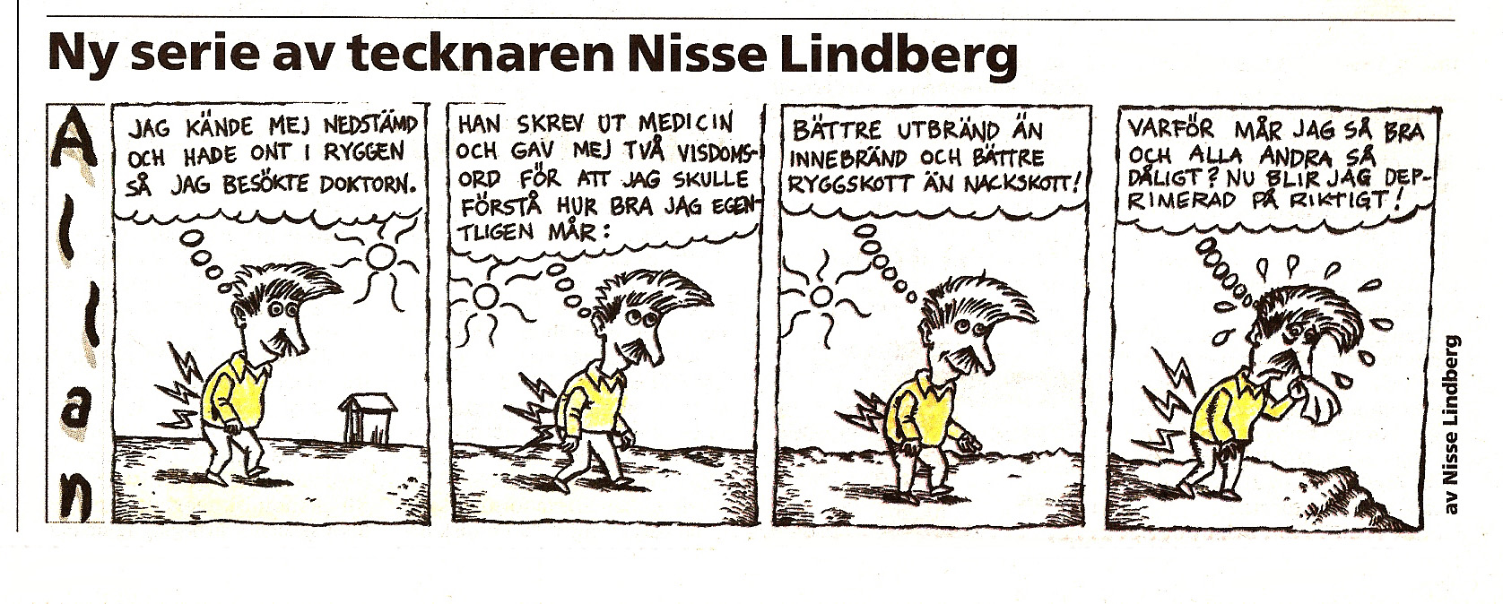 Första strippen med Allan som publicerades i LO-tidningen